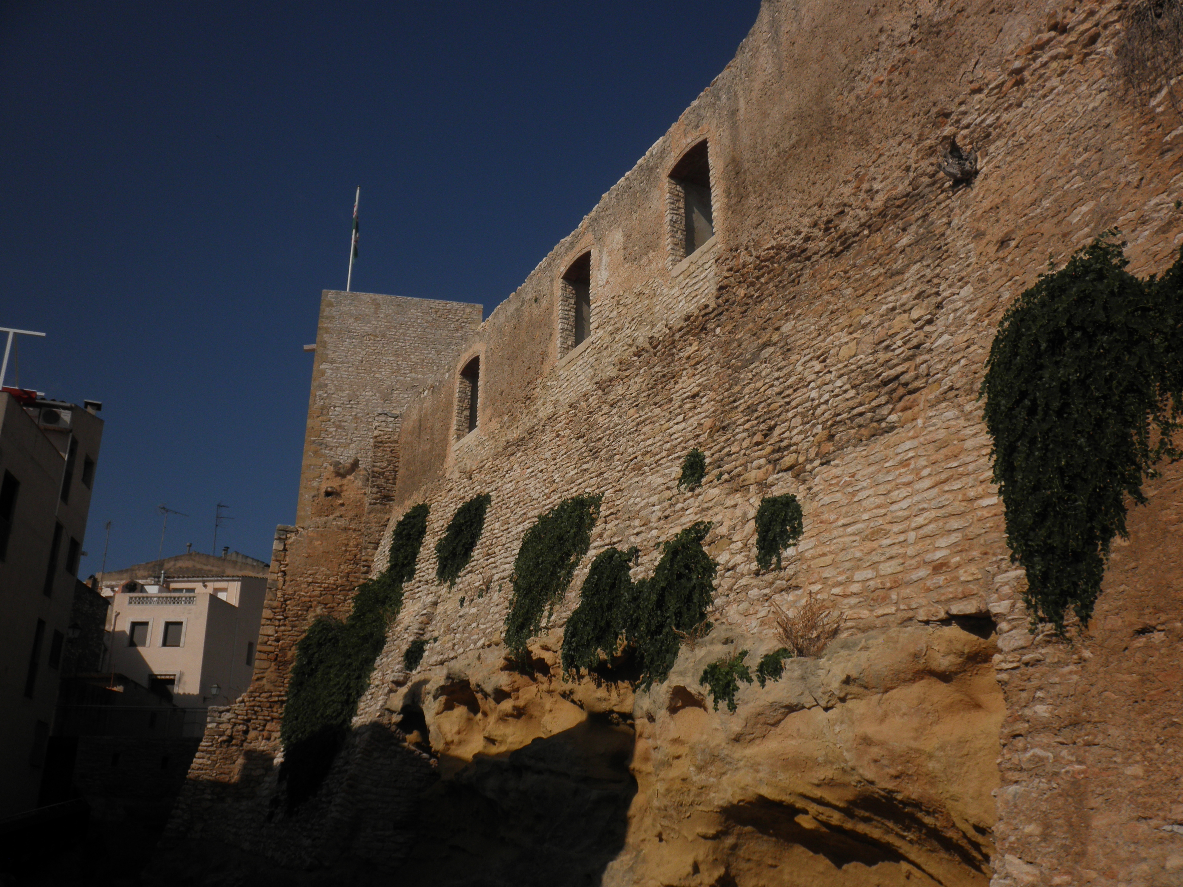 Castell del Catllar